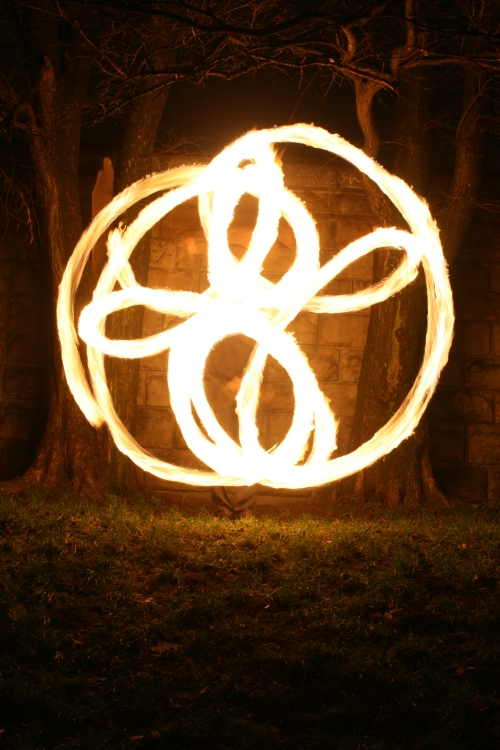 Teatr Ognia SIRRION, poi